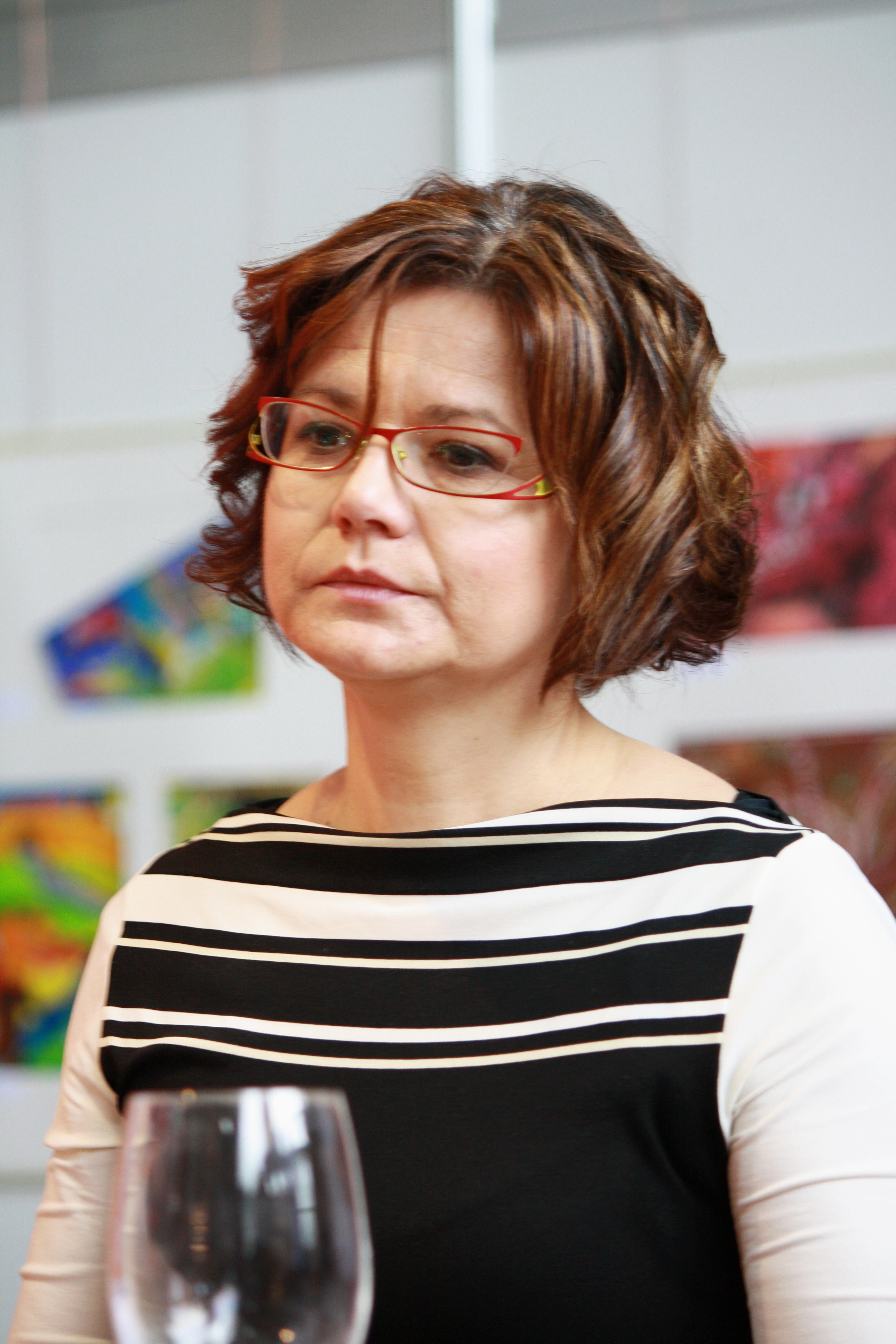 Knižní veletrh Svět knihy 2010 - křest knihy O češtině 3 na stánku České televize Personality rights warningAlthough this work is freely licensed or in the public domain, the person(s) shown may have rights that legally restrict certain re-uses unless those depicted consent to such uses. In these cases, a model release or other evidence of consent could protect you from infringement claims.